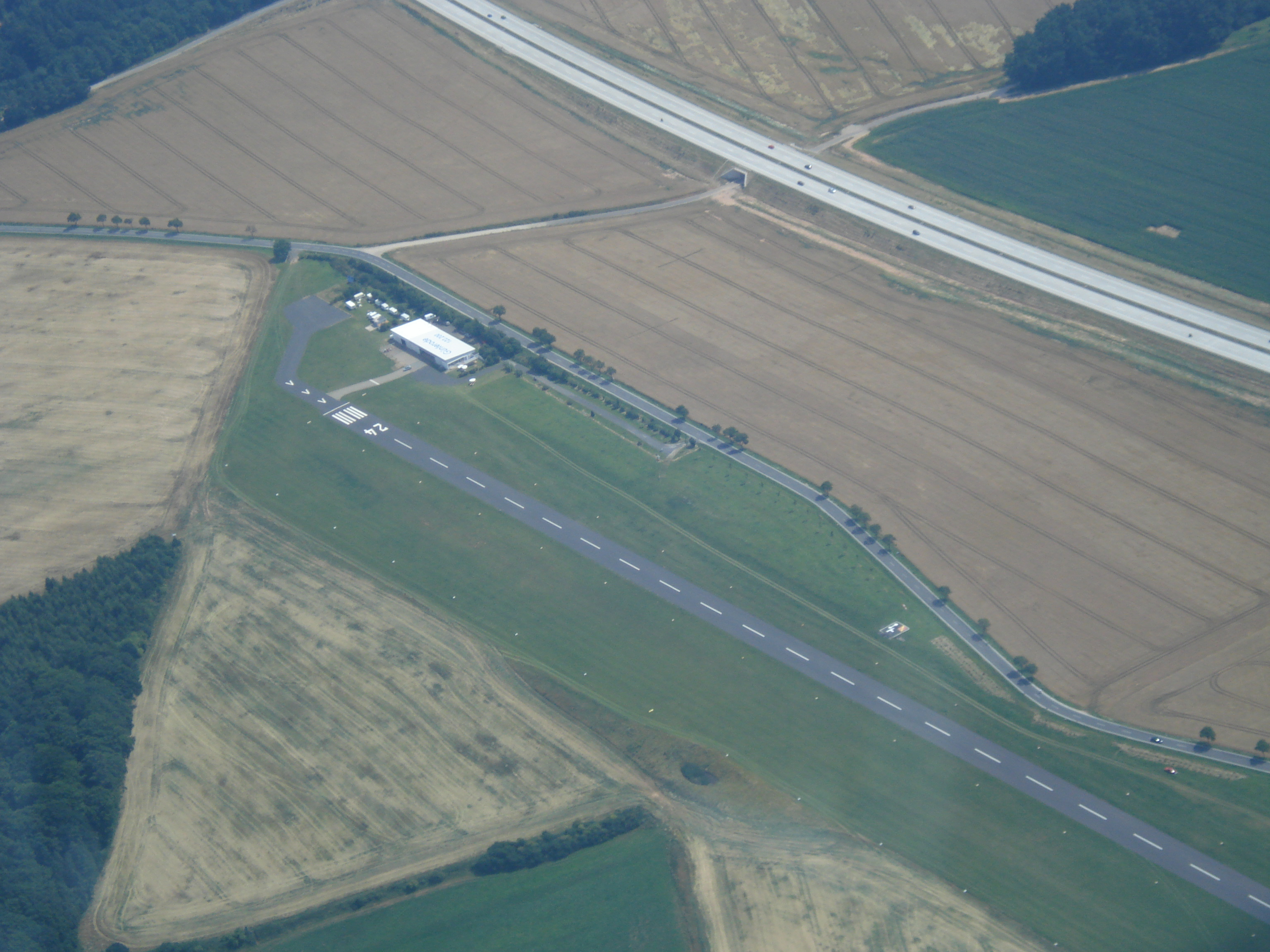 Flugplatz Günterode-Heiligenstadt aus der Luft